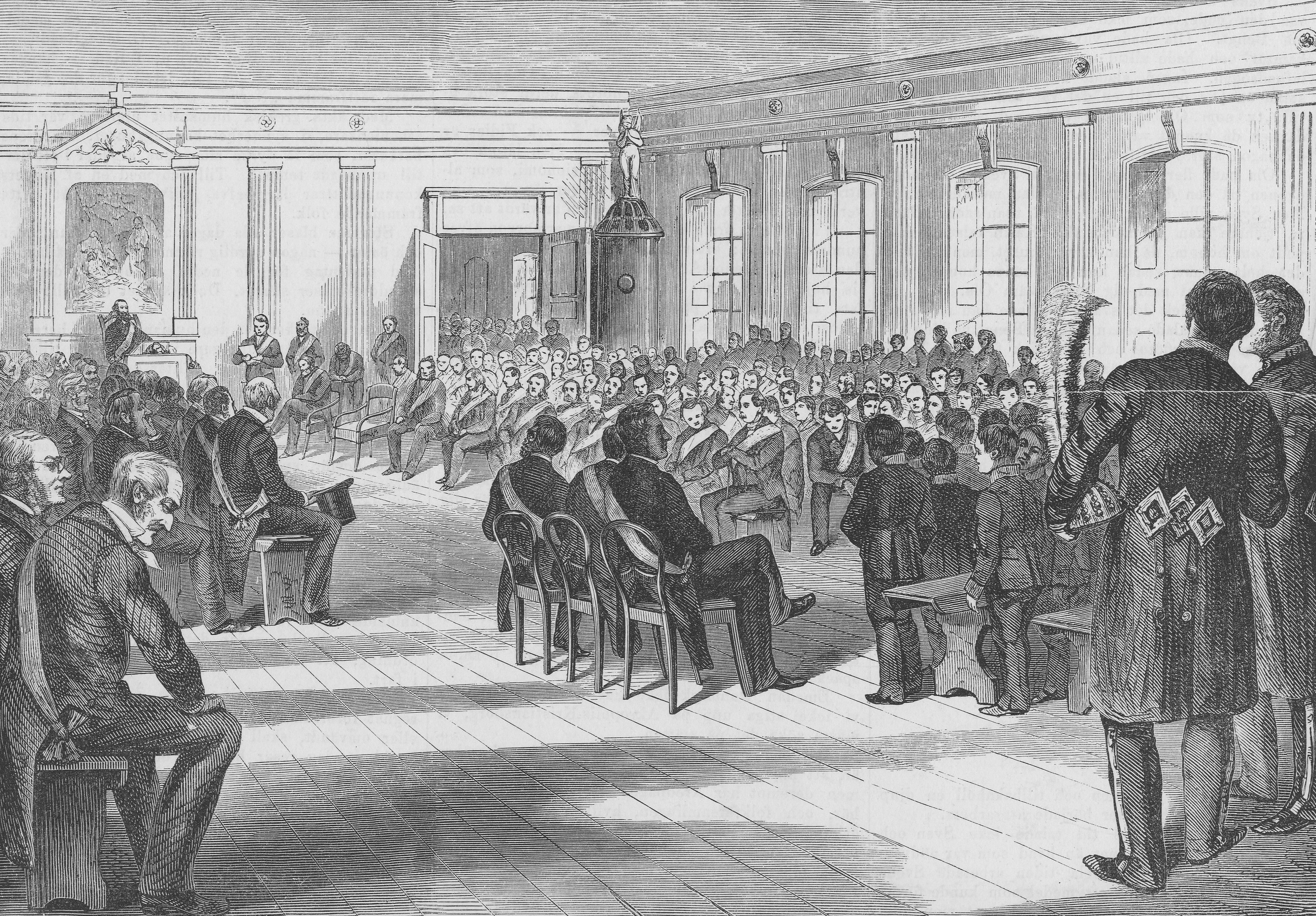 Invigningen av Frimurarebarnhuset Kristineberg den 31 juli 1867 (Ny Illustrerad Tidning)